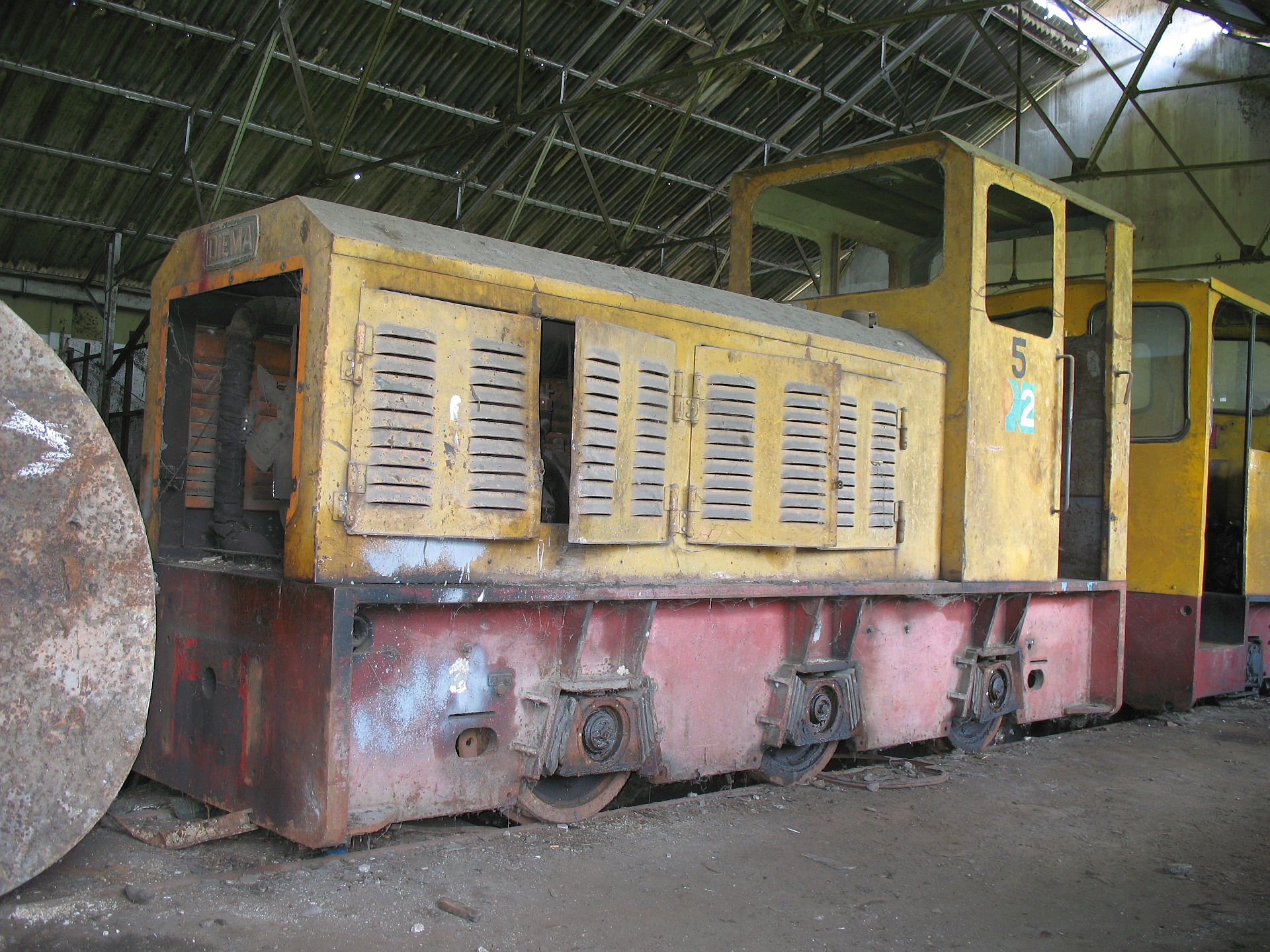 Sawit Seberang, 31.07.2008